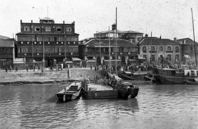 China, Nanking, Hafen China, Nanking am Jangtse